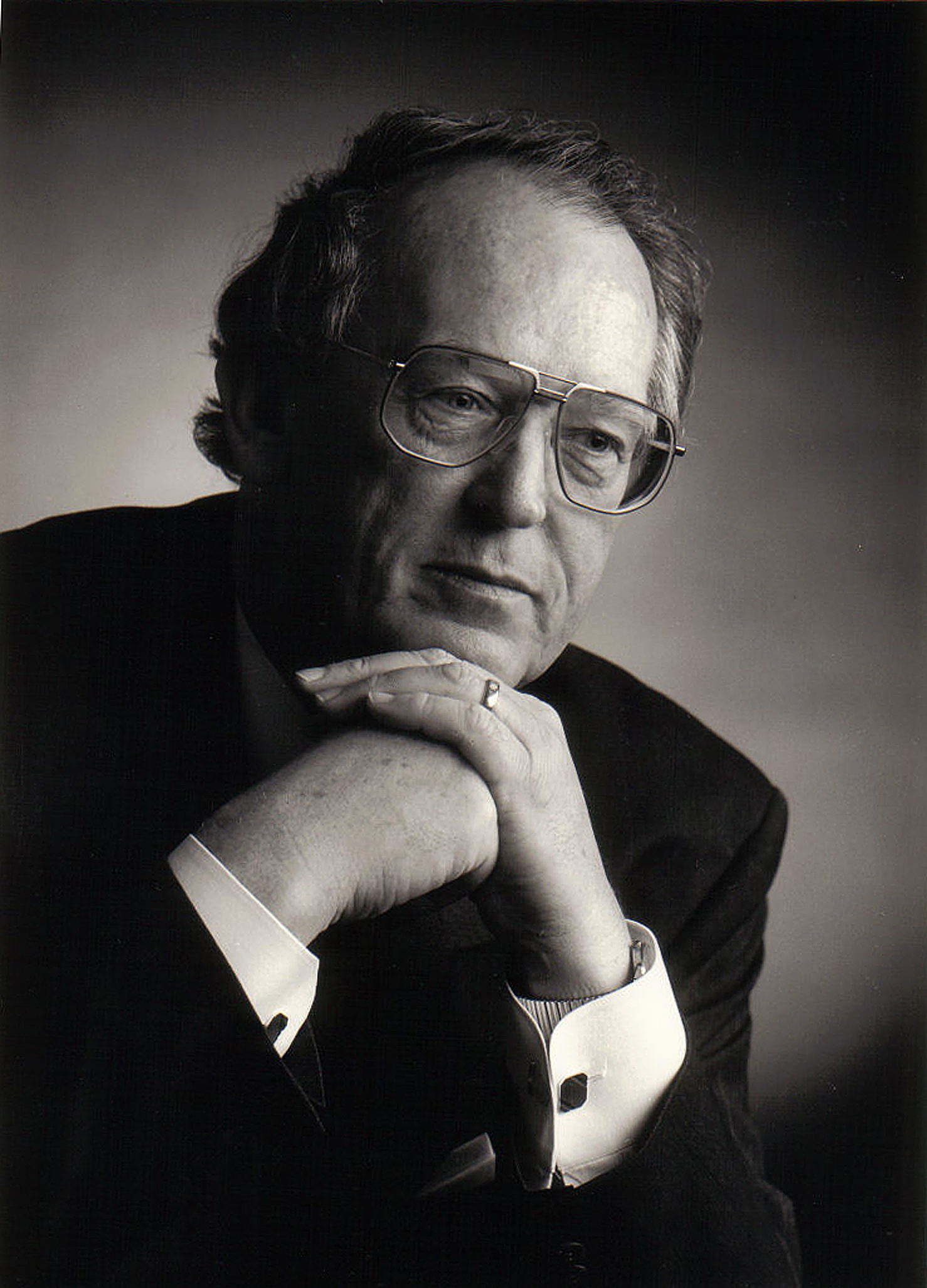 Nachdenklicher Egon Berchter